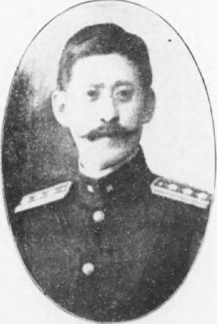 手塚敏郎（1873-1933）